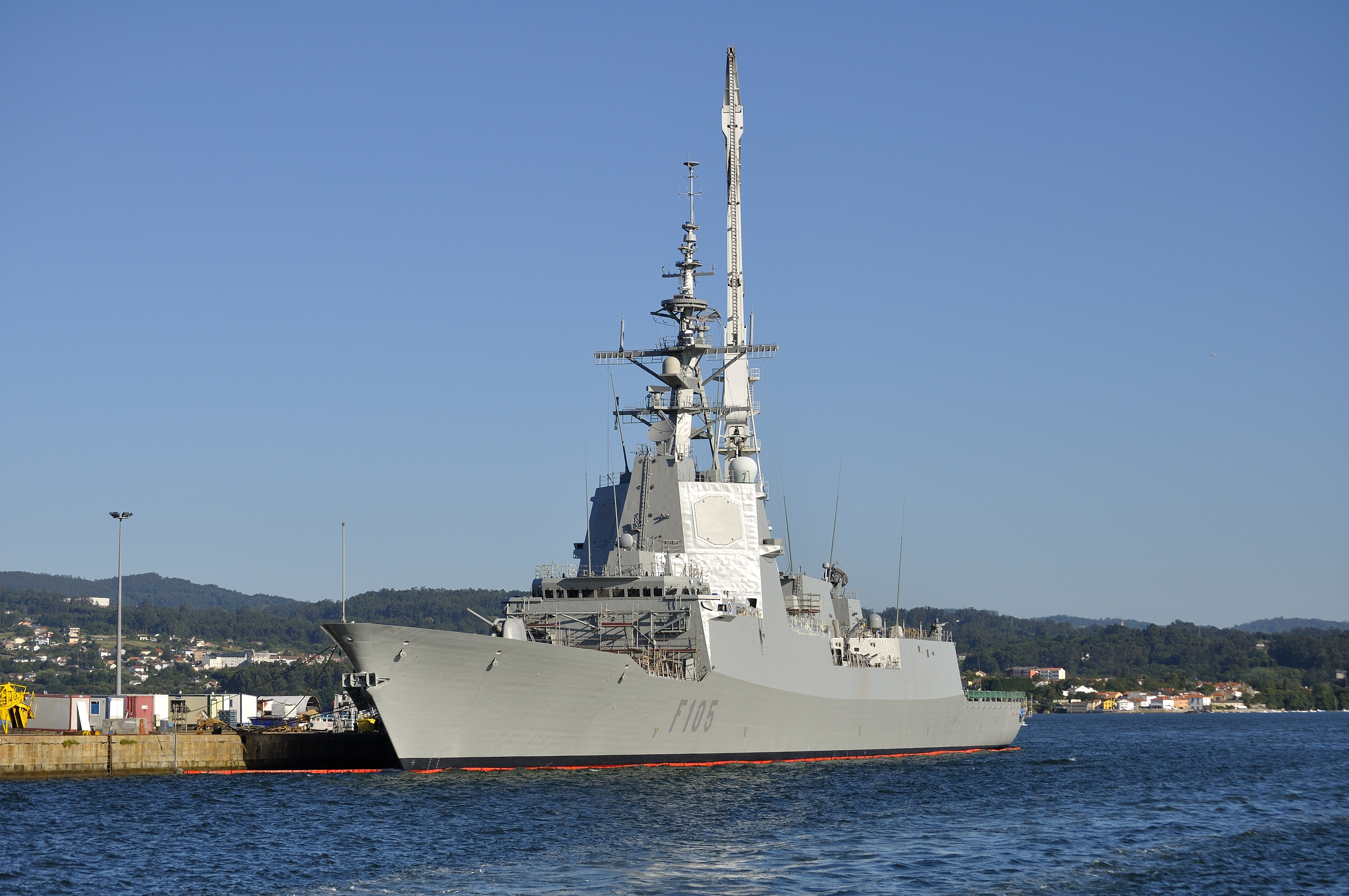 Fragata "Cristóbal Colón", de la Armada Española, de la clase Álvaro de Bazán.